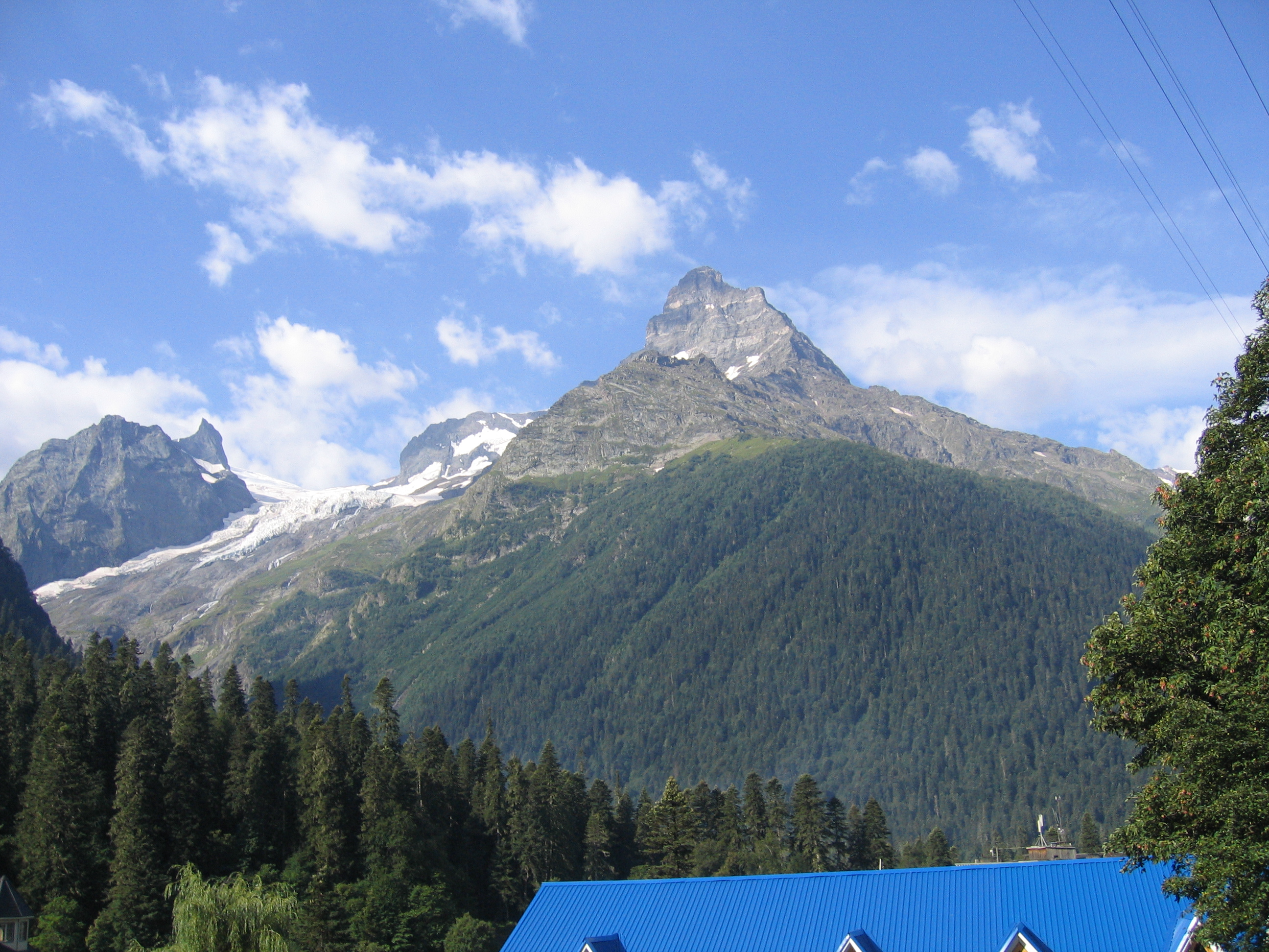 Вид на гору Белалакая из Домбайской поляны